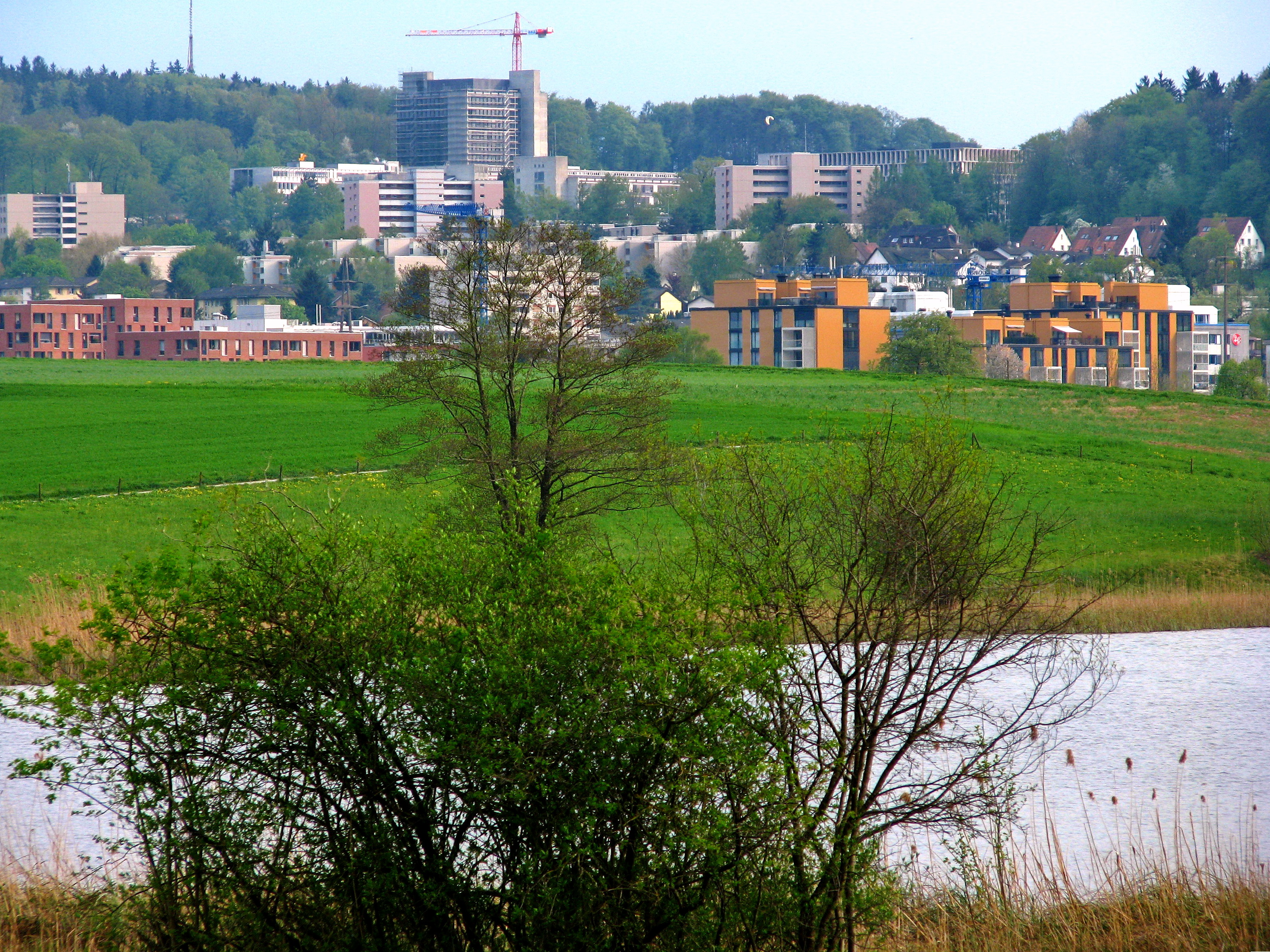 Zürich-Affoltern as seen from Katzensee (oberer Katzensee)